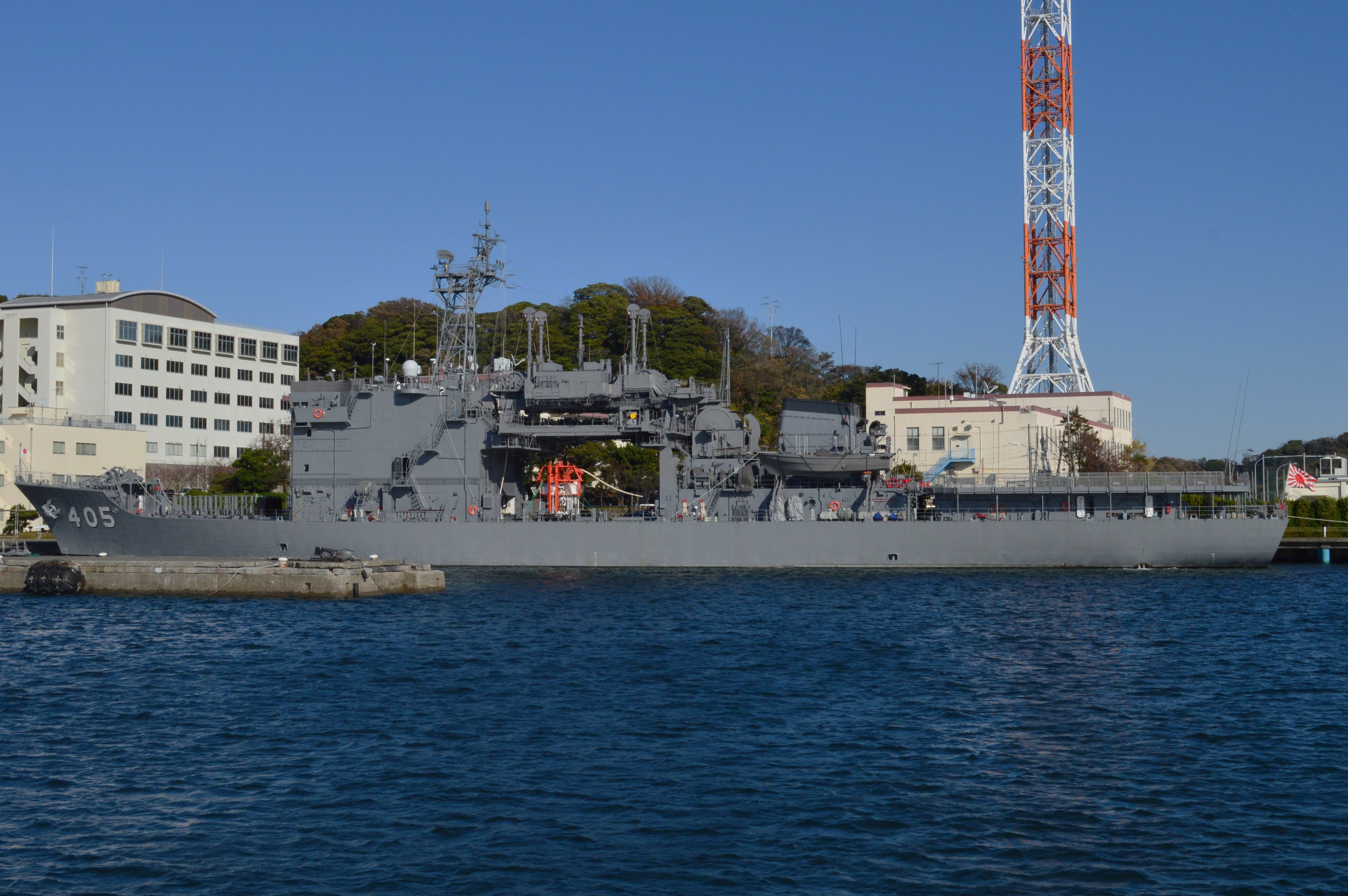 ちよだ (横須賀港にて)